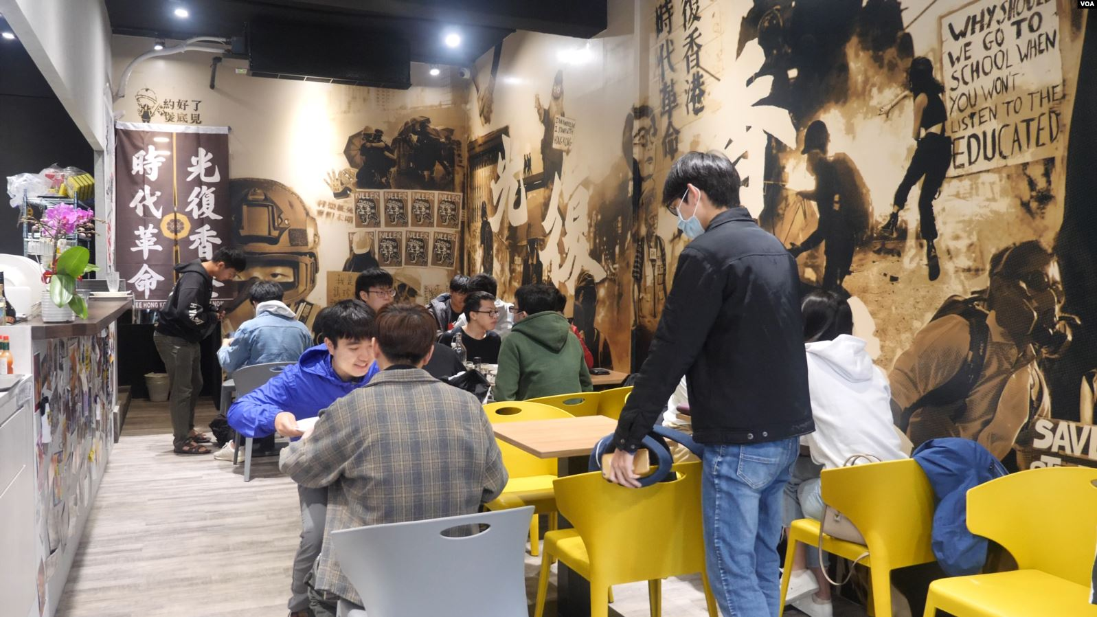 “保护伞”餐厅4月19日于台北开张，由流亡港人经营，提供香港民主斗士来台后一个合法工作的地方